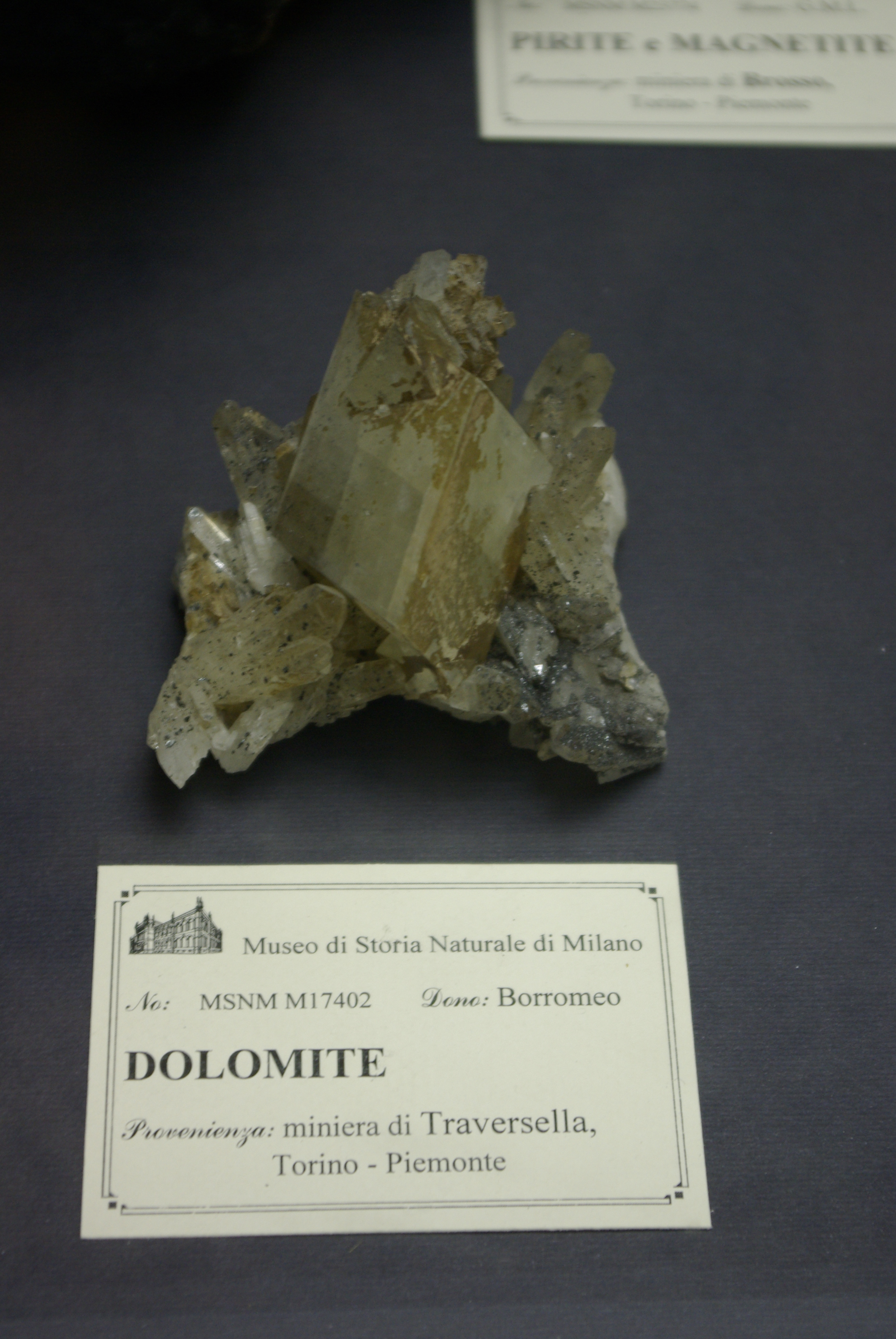 Museo civico di storia naturale This is a photo of a monument which is part of cultural heritage of Italy.